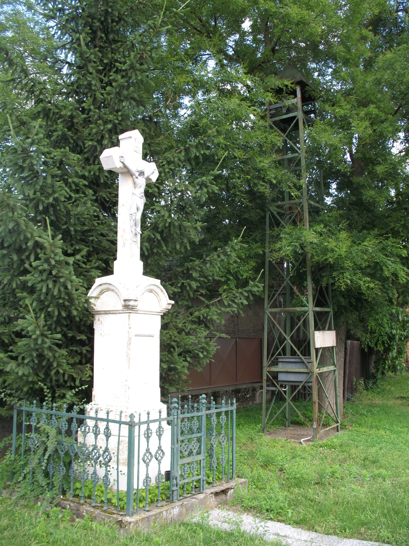 Olgya falu